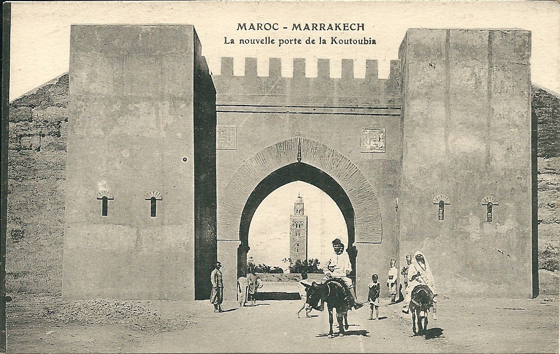 La nouvelle porte Koutoubia à Marrakech (Maroc)